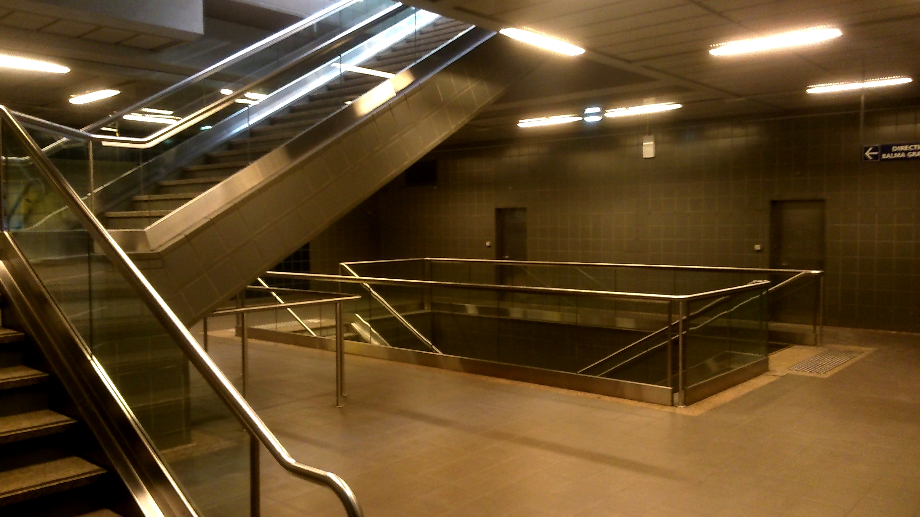 1er sous-sol de la station Fontaine-Lestang du métro de Toulouse